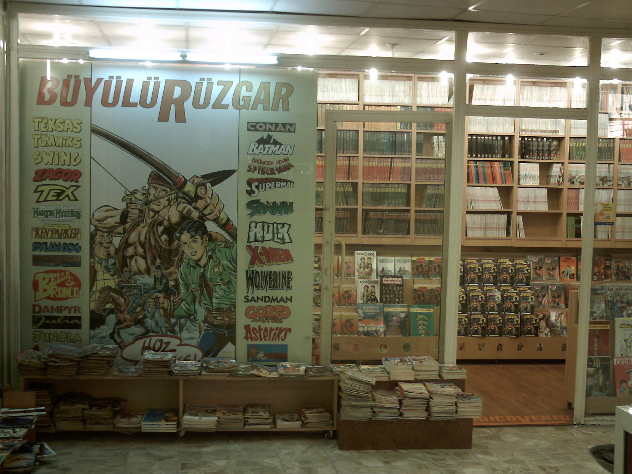 חנות הקומיקס Büyülü Rüzgar בhe:איסטנבול שבhe:טורקיה